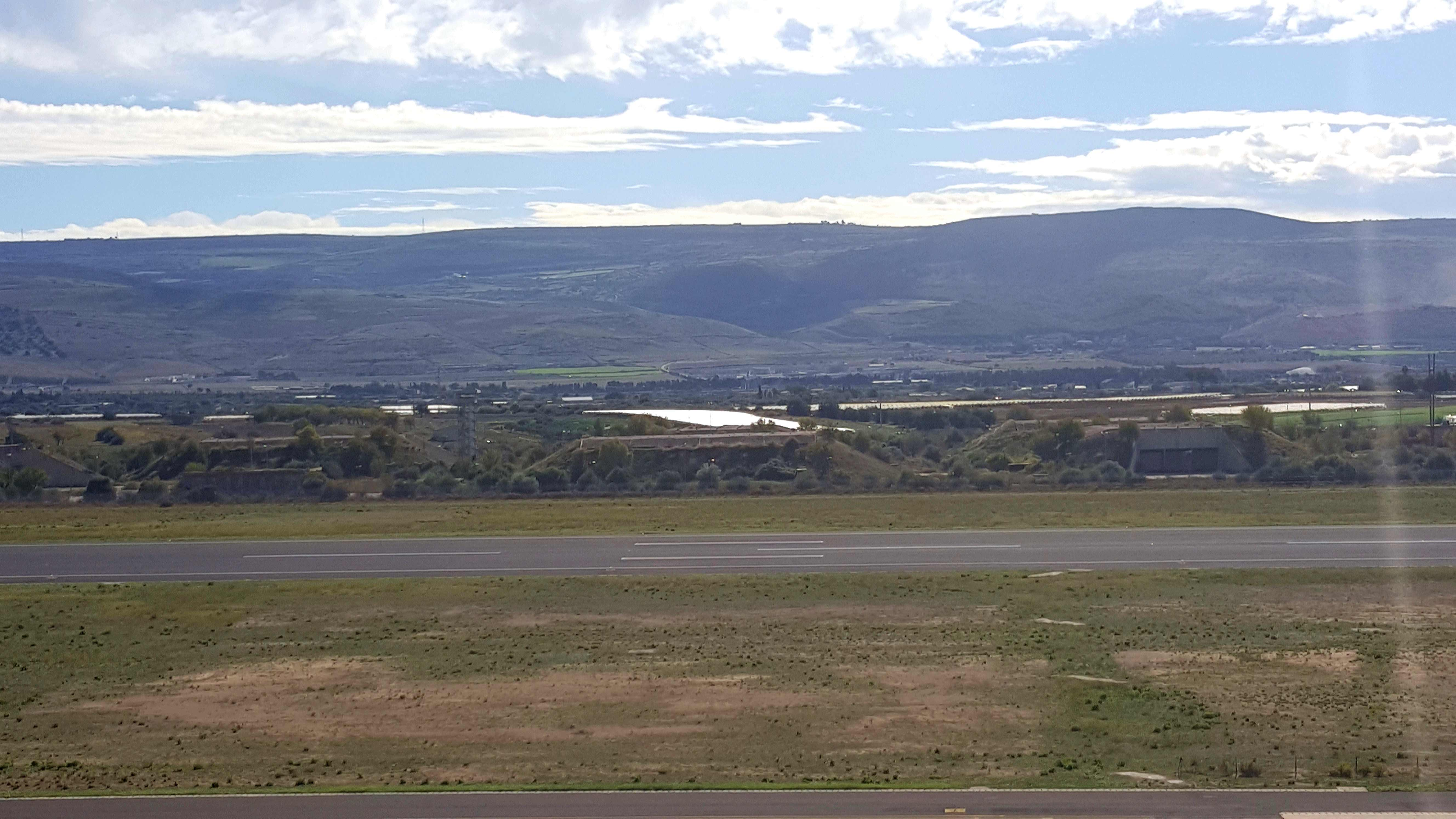 Aeroporto di Comiso, i bunker abbandonati da anni.